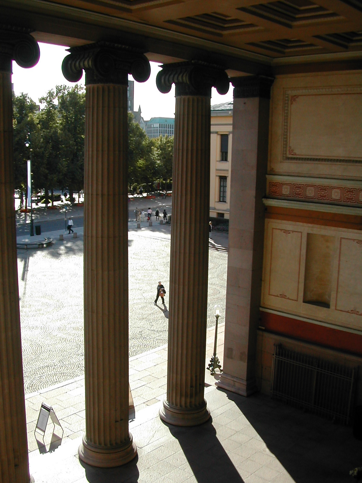 Midtbygningen, Universitetet i Oslo (Karl Johan)